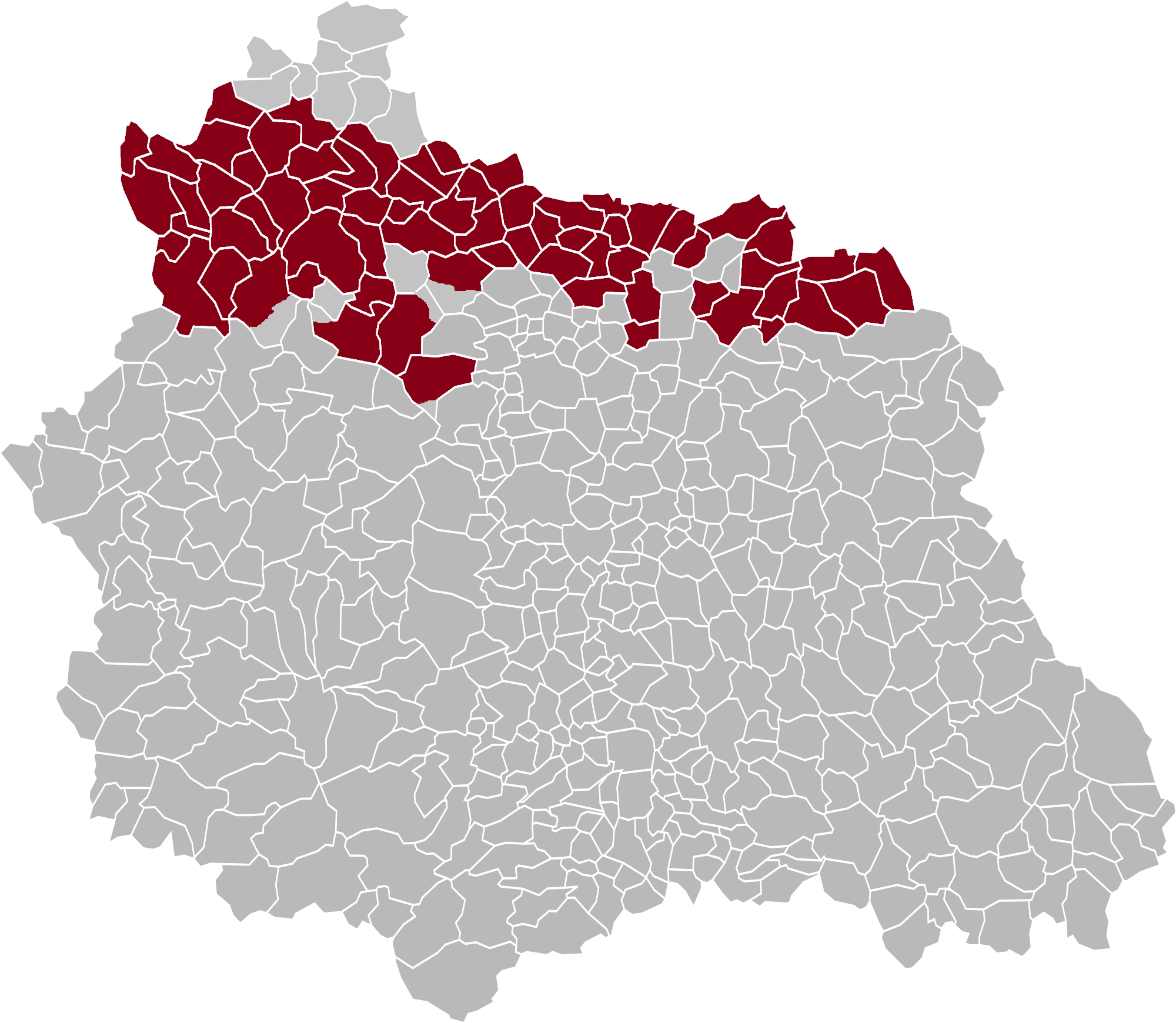 Généralité de Moulins dans le Puy-de-Dôme. Source : Carte de la Généralité de Moulins sur Gallica